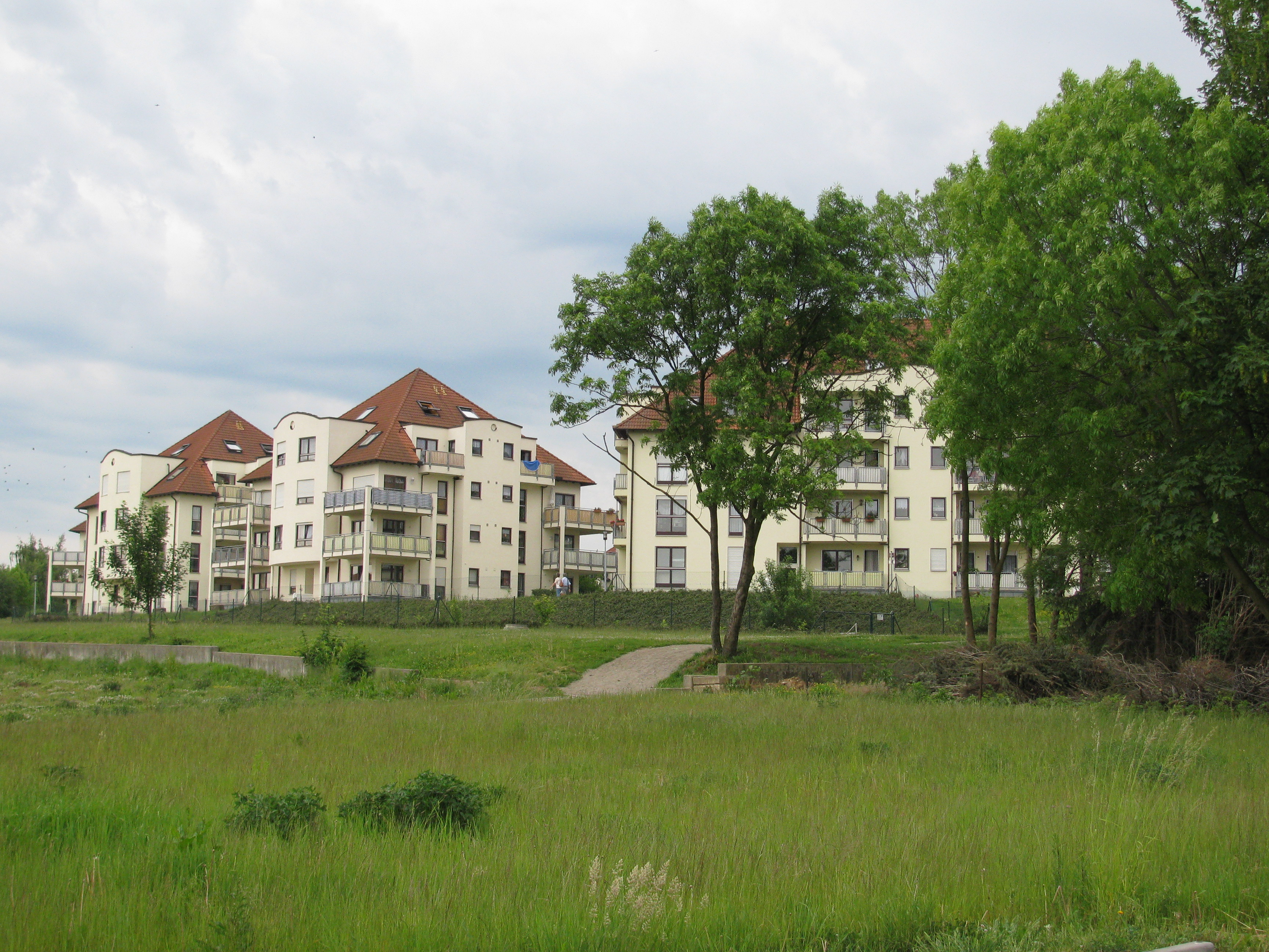 Gompitz (Ortsteil der Landeshauptstadt Dresden): typische, nach 1990 errichtete Neubebauung